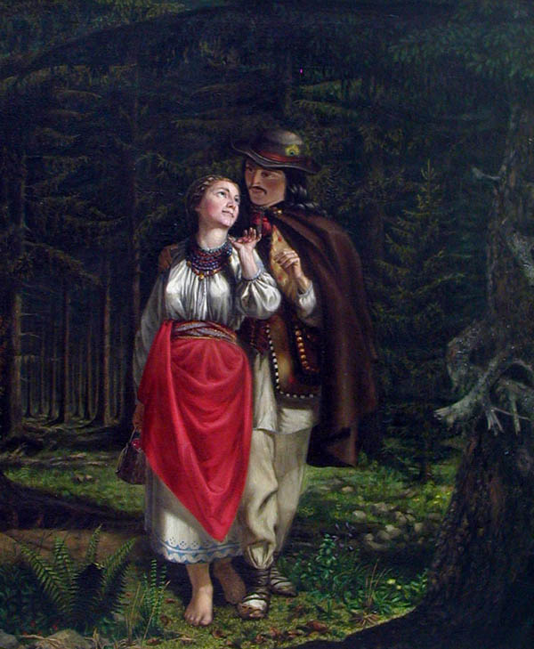 Boyko pairlabel QS:Len,"Boyko pair" label QS:Luk,"Бойківська пара." label QS:Lru,"Бойки. Пара"